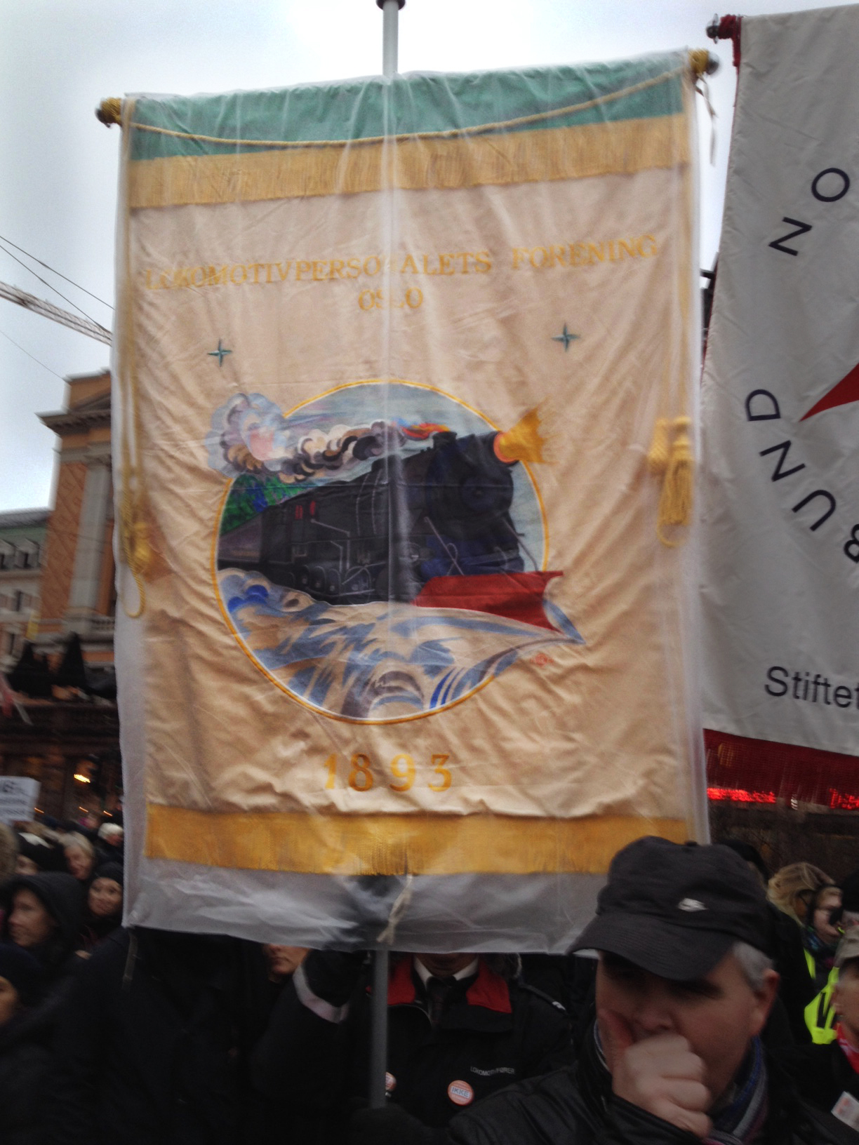 Lokomotivpersonalets Forening Oslo fane 2015, i regnvær, dekket av pløast